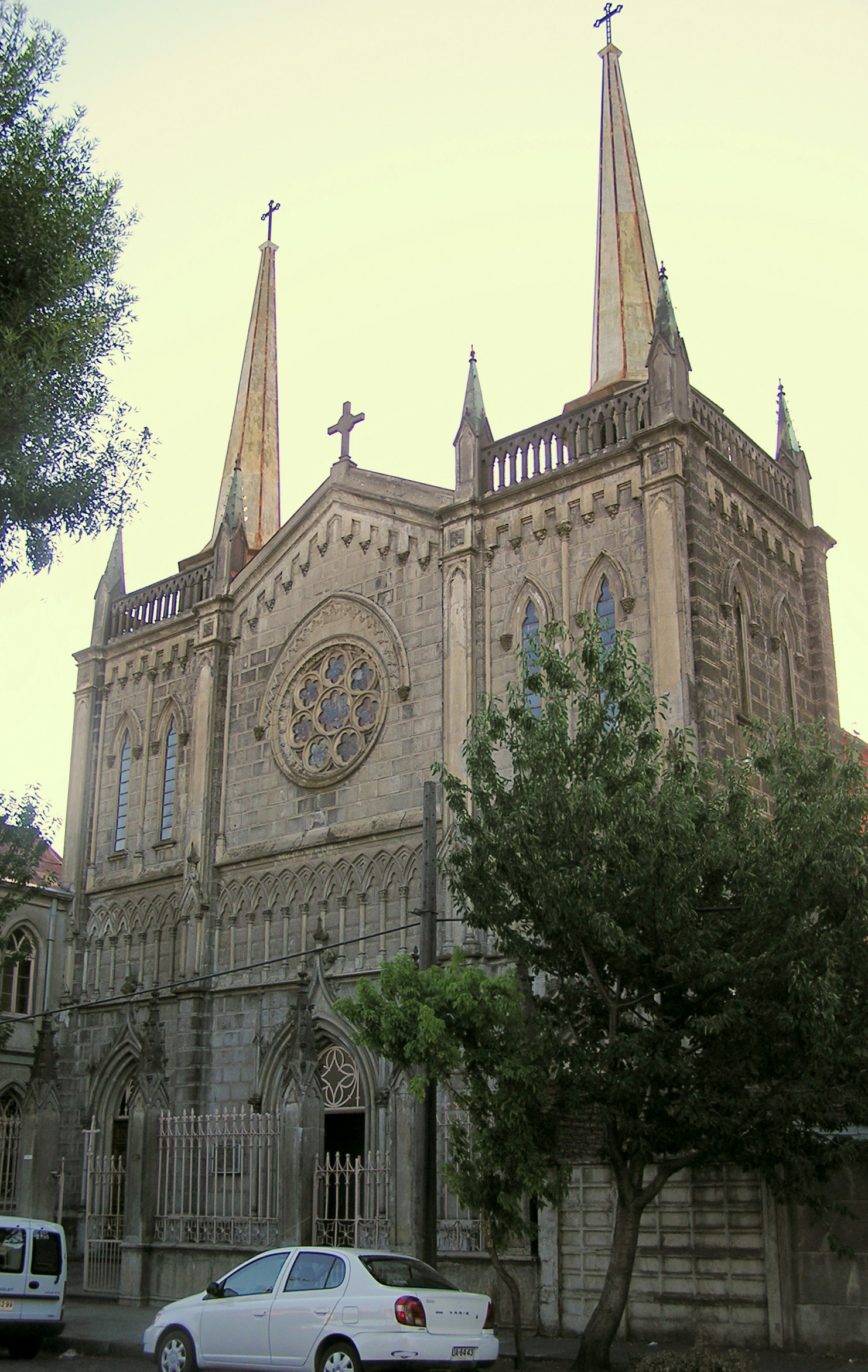 Vista de la Iglesia de la Virgen del Carmen de Chillán This is a photo of a national monument in Chile: 2208